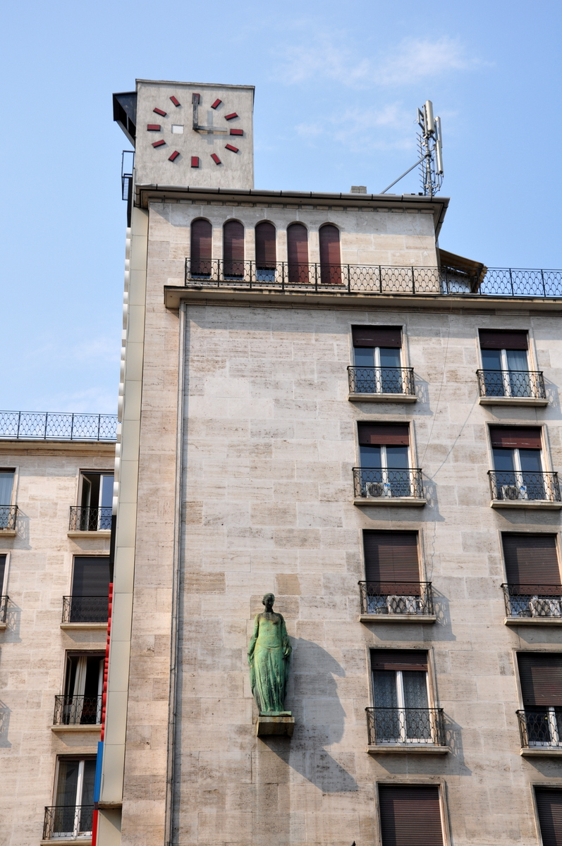 Georgia lakóház, Astoria, Budapest